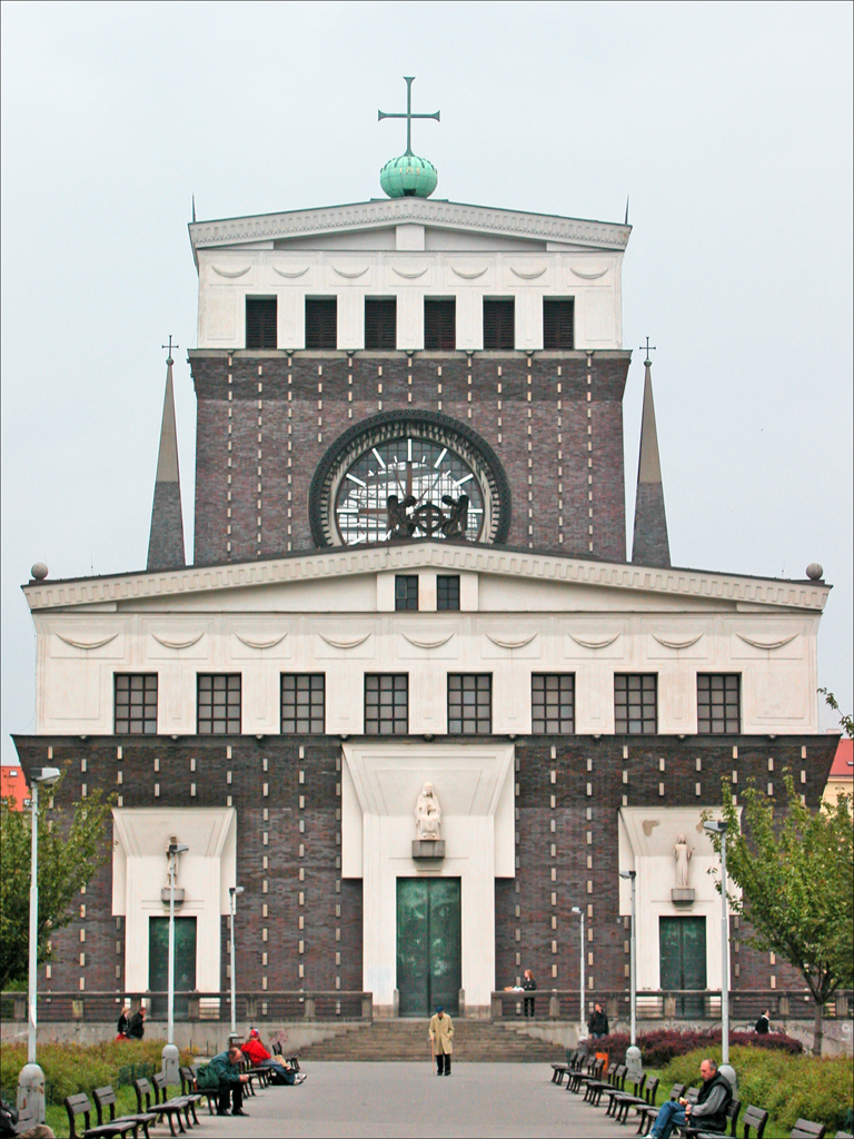 Façade de l’Église du Sacré-Coeur de Jože Plečnik Quartier résidentiel Vinohrady à Prague Photo prise par l'auteur en 2005 lors d'un voyage à Prague site du voyage l'architecte Jože Plečnik a conçu cette édifice un peu avant l'église Saint-François d'Assise de Ljubljana autre réalisation de Jože Plečnik photographiée à Vienne : la "Langer House" à Hietzing